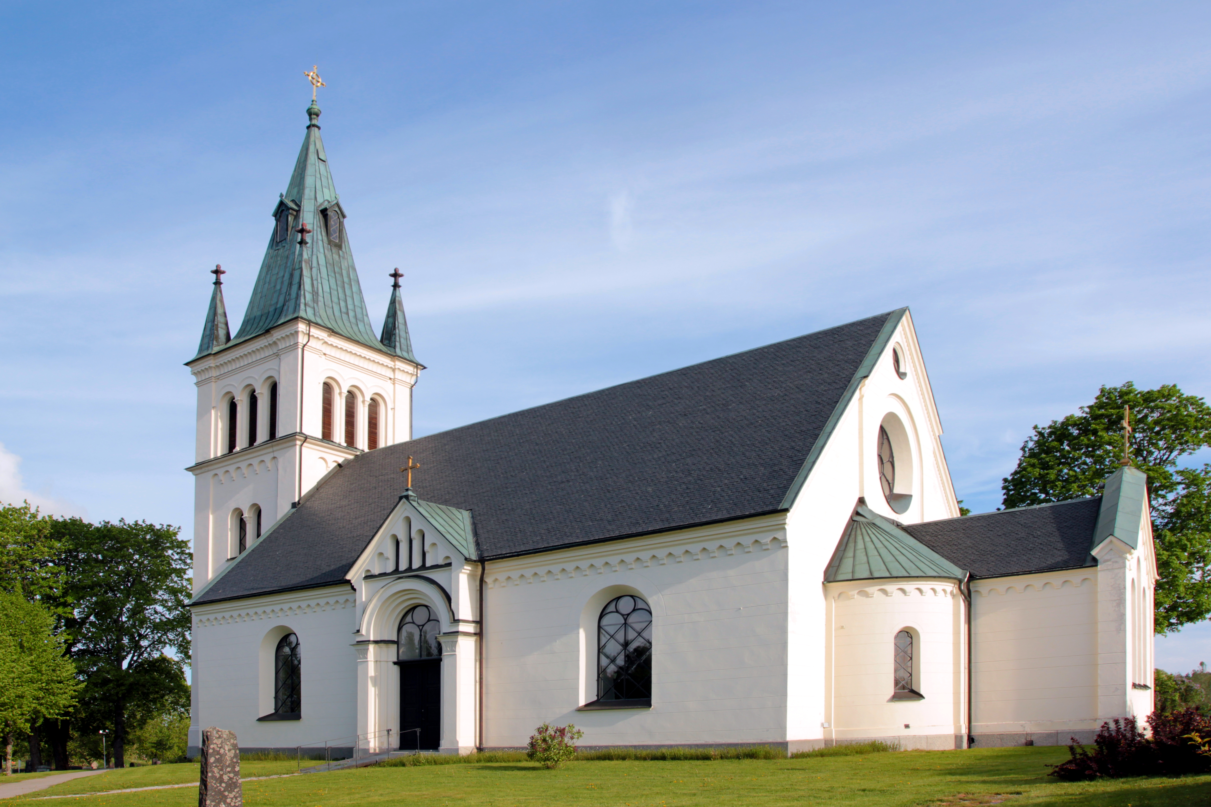 Norrby kyrka. Foto uppladdat som en del i Bergslagssafarin 26 maj 2012.